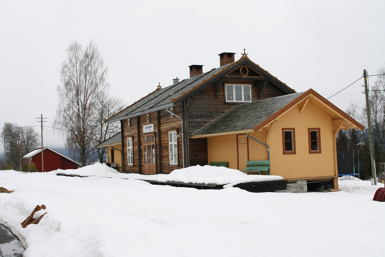 Snarum stasjon på Krøderbanen